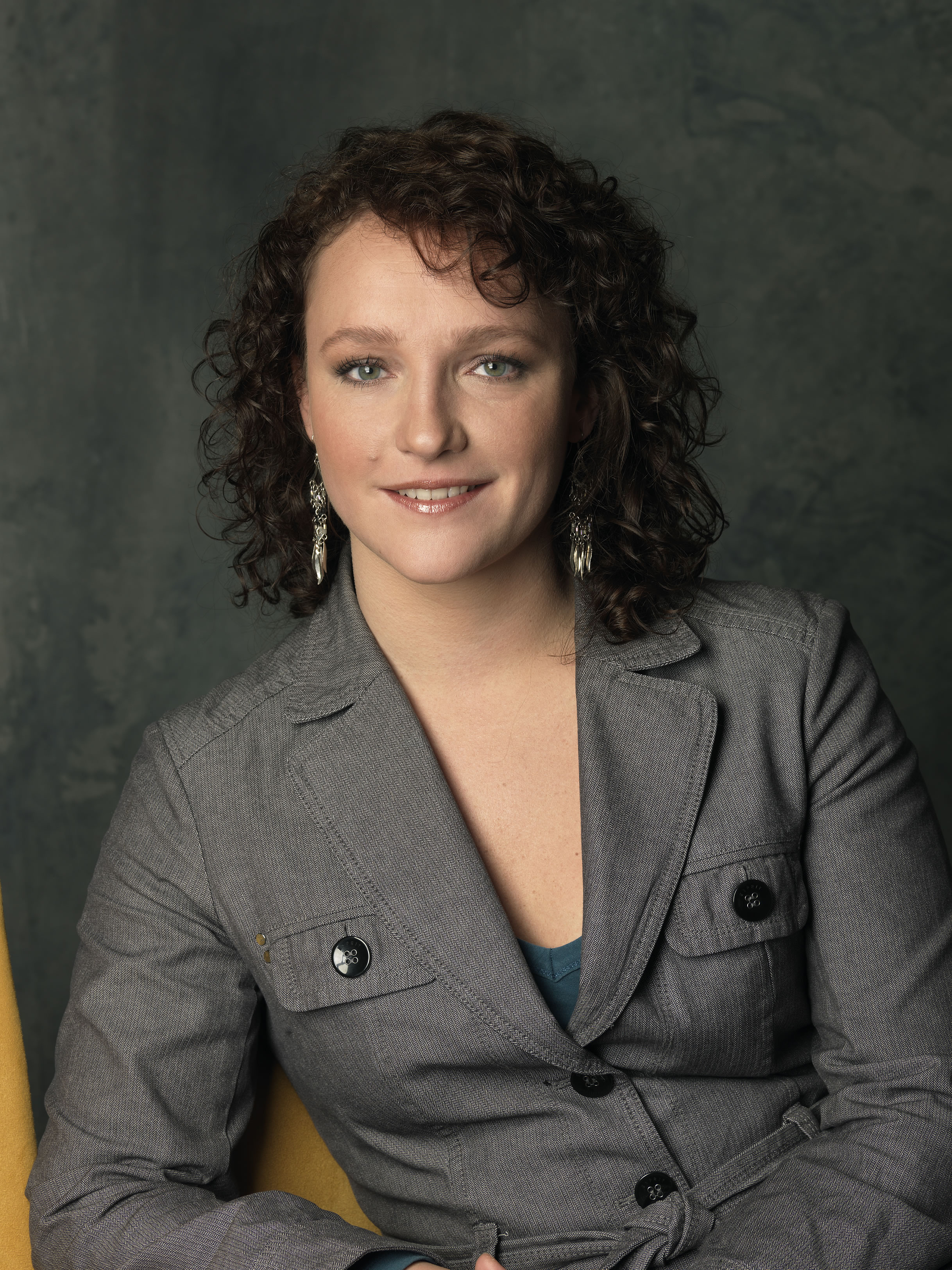 Renske Leijten